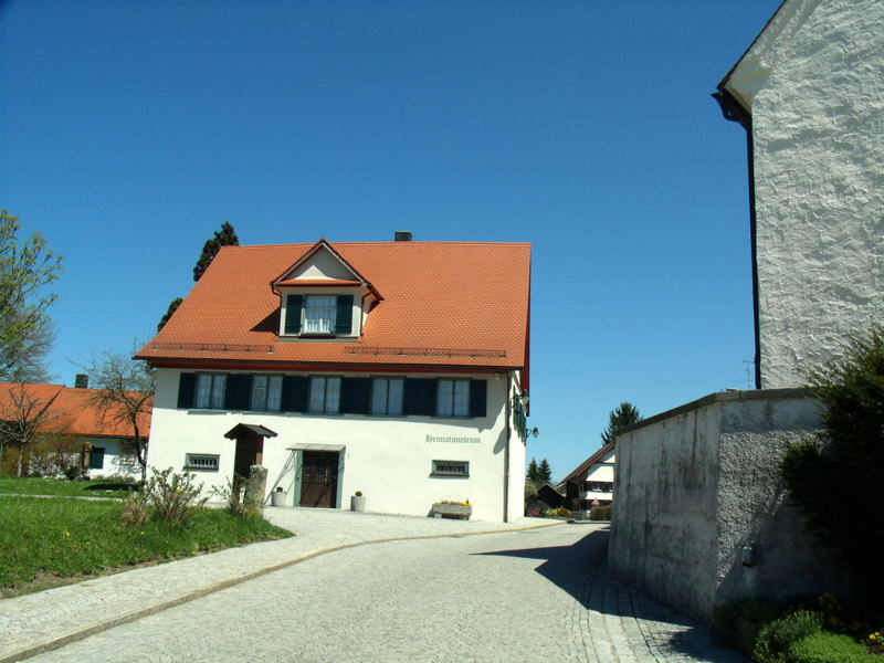 Hergensweiler